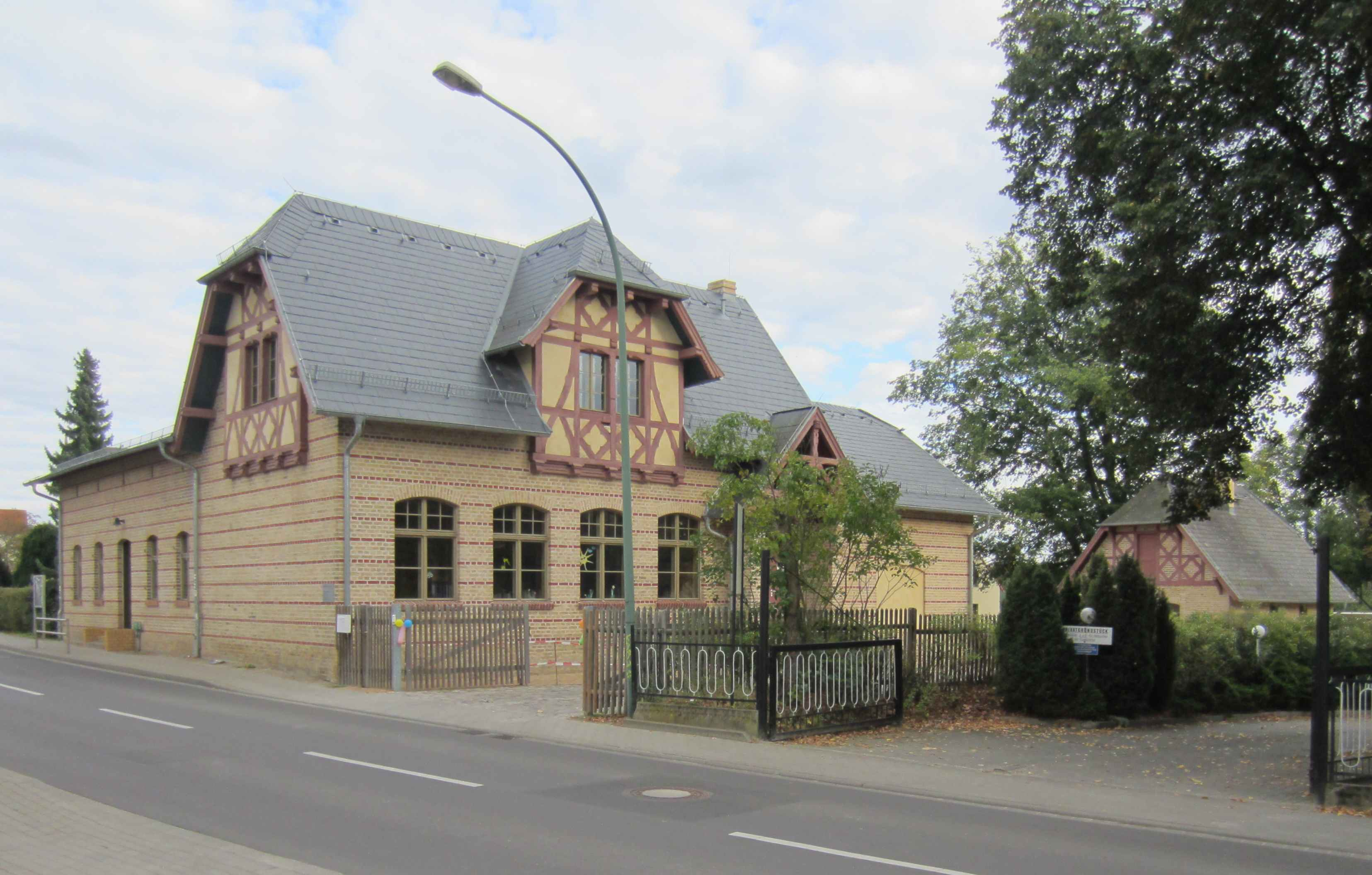 Denkmalgeschützte ehemalige Dorfschule in Eiche (Potsdam), Kaiser-Friedrich-Straße 106